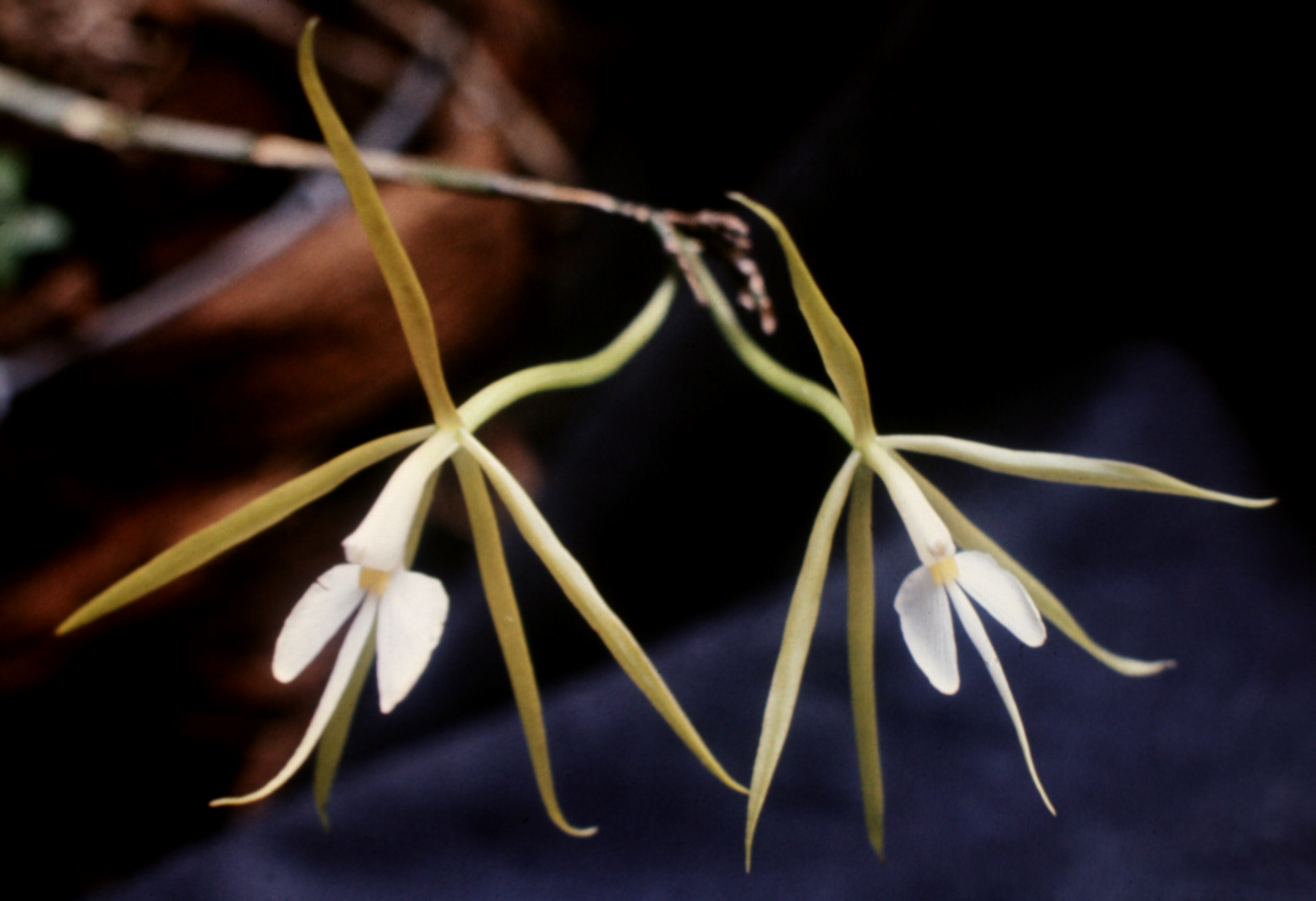 Epidendrum nocturnum, Suriname.